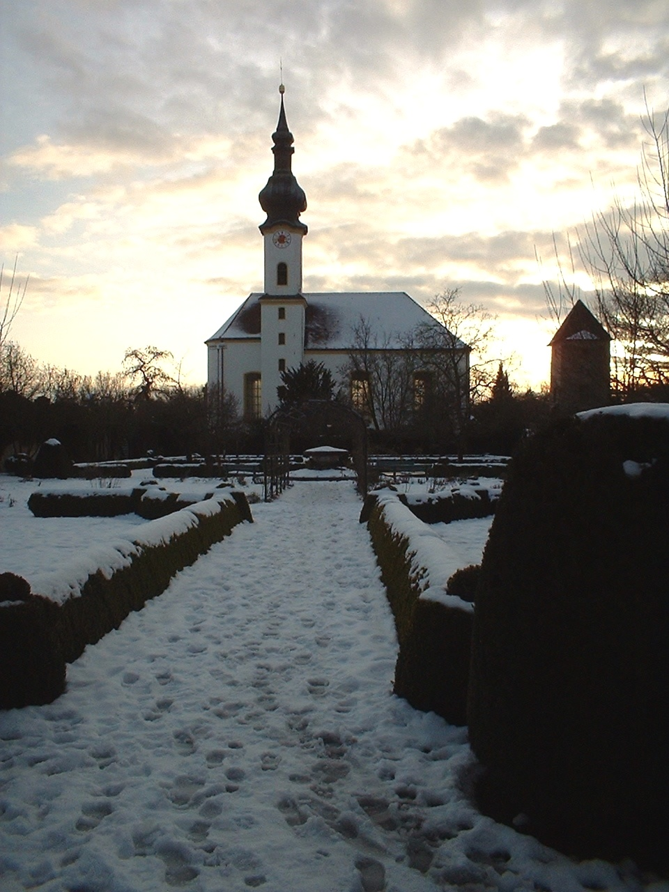 Kath. Kirche St. Joseph in Starnberg (selbst fotografiert)